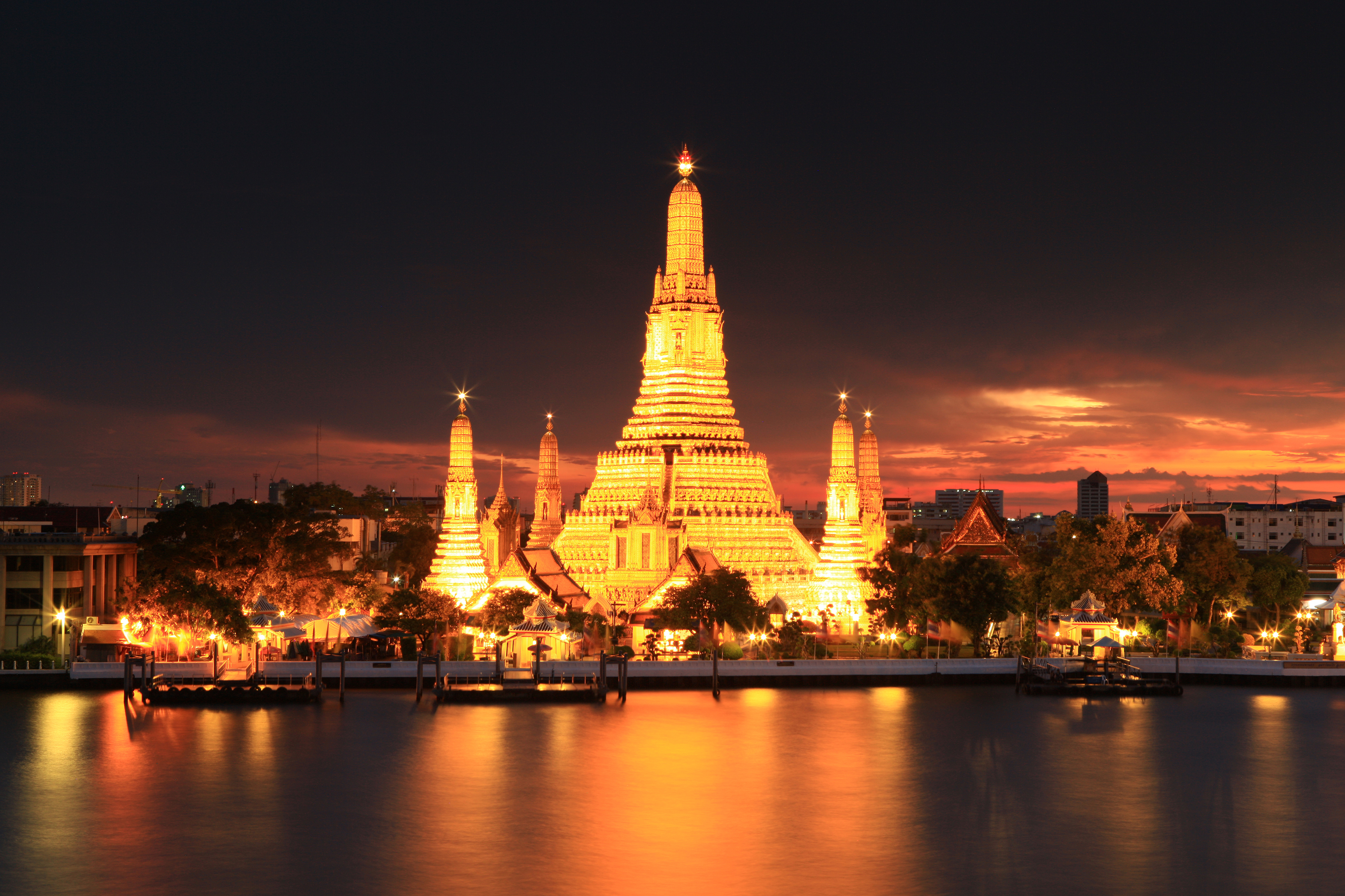 วัดอรุณราชวราราม